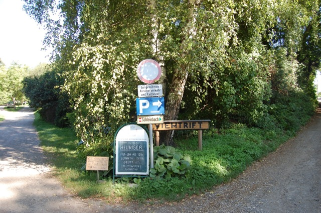 Viehtrift